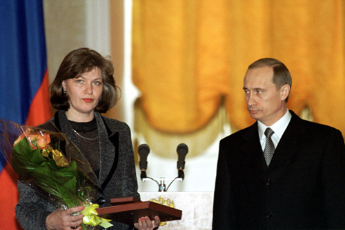 Светлана Малофеева принимает награду за своего мужа Михаила Малофеева, посмертно удостоенного звания Героя Российской Фередации